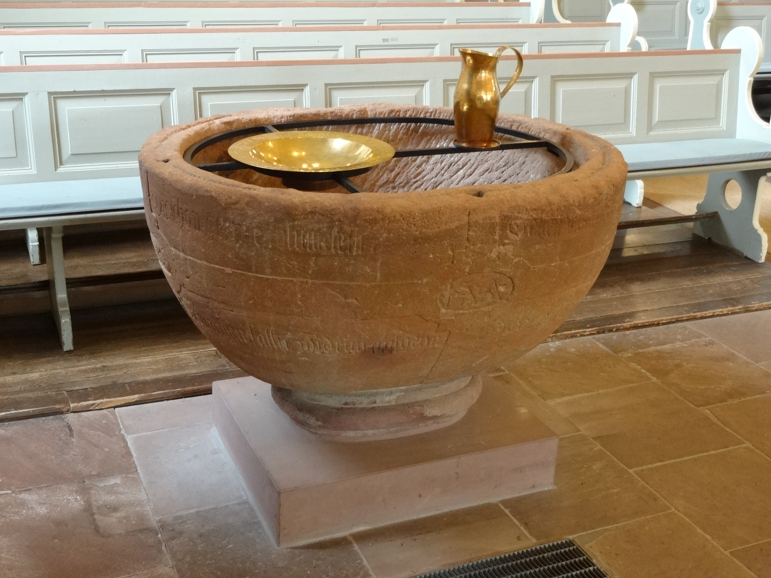 Evangelische Pfarrkirche (Nieder-Weisel)